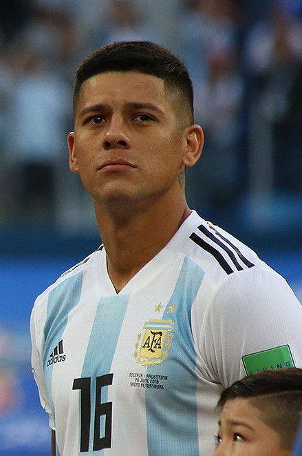 Гол Рохо в концовке выводит Аргентину в плей-офф чемпионата мира